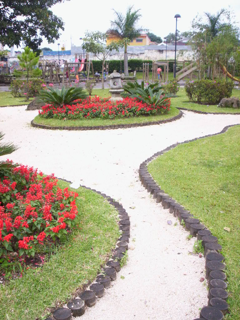 Okayama, jardín de piedras